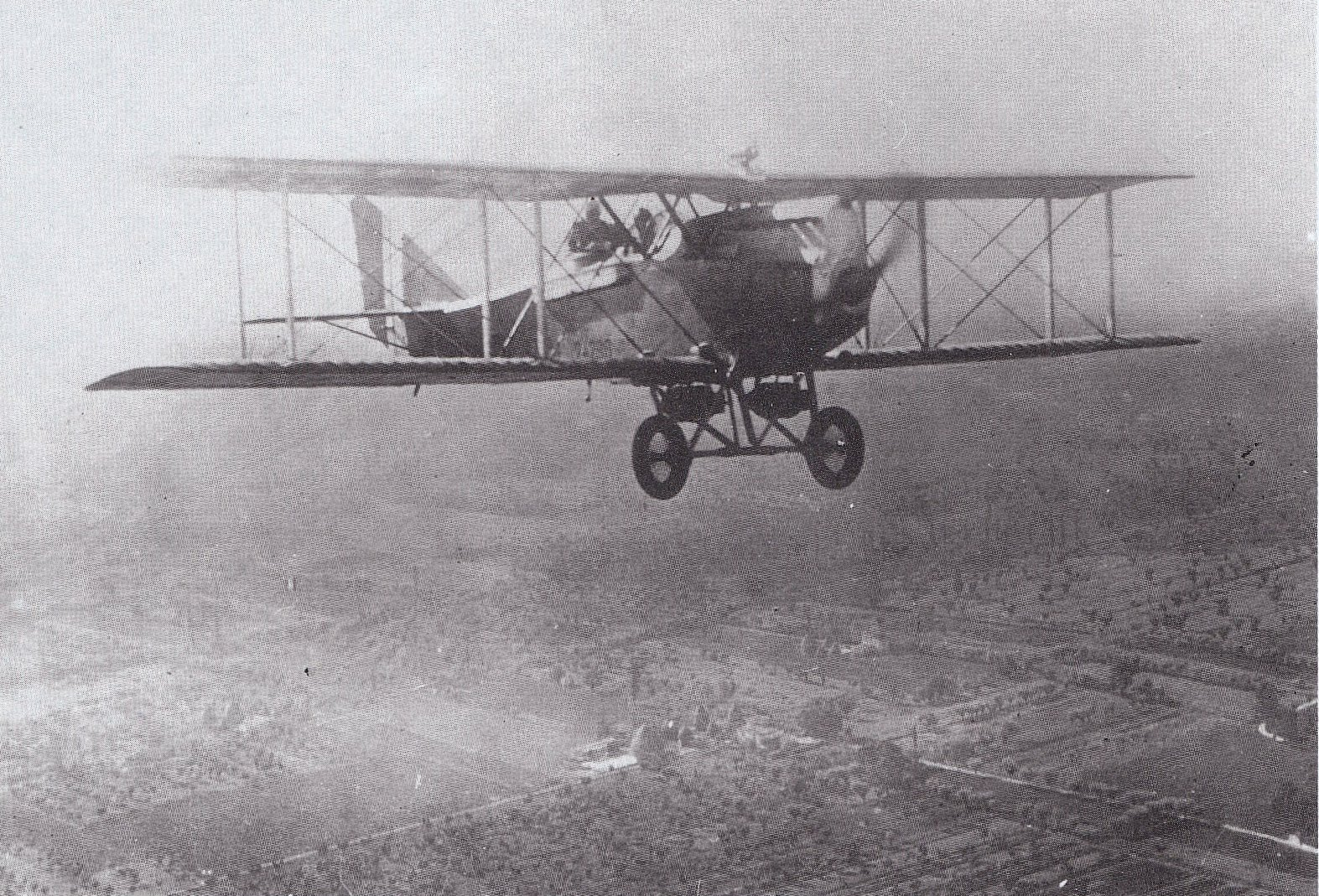 Ansaldo A.300, aereo militare multiruolo in servizio tra gli anni venti e i primi anni trenta del XX secolo.